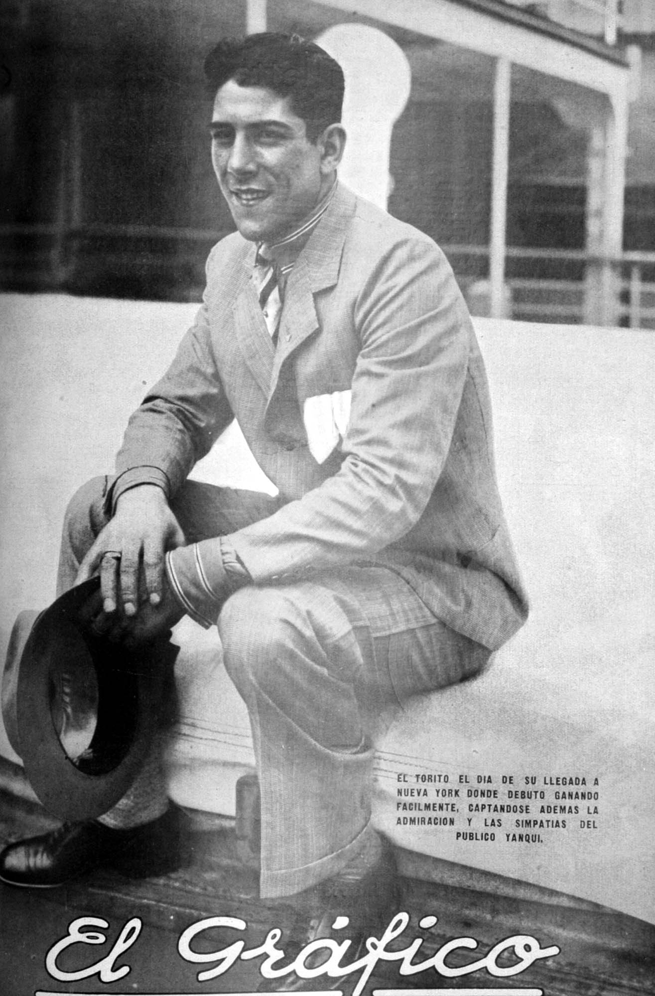 El Grafico del 26 de Julio de 1930. Edicion 576